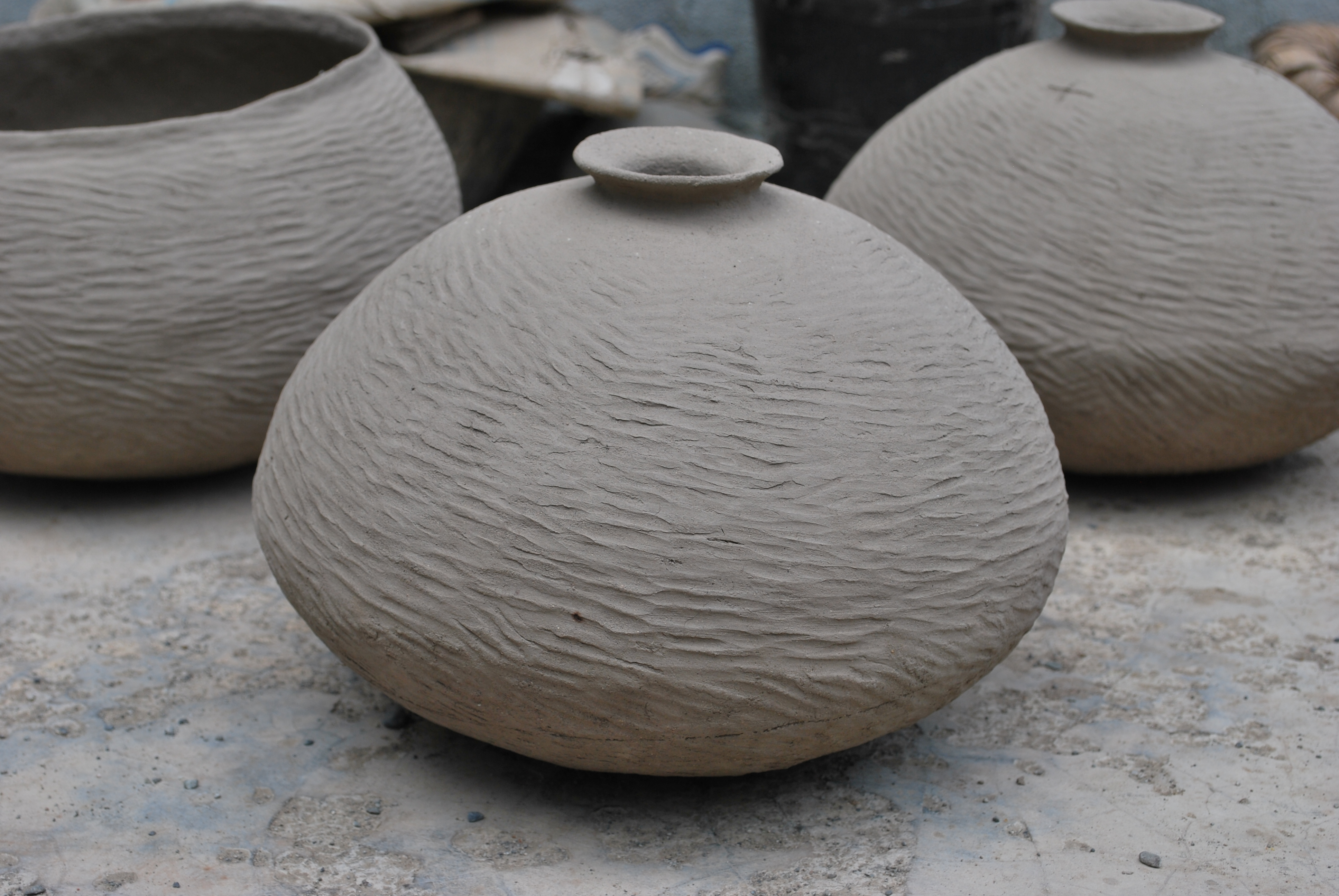 Krug in Cova Lima